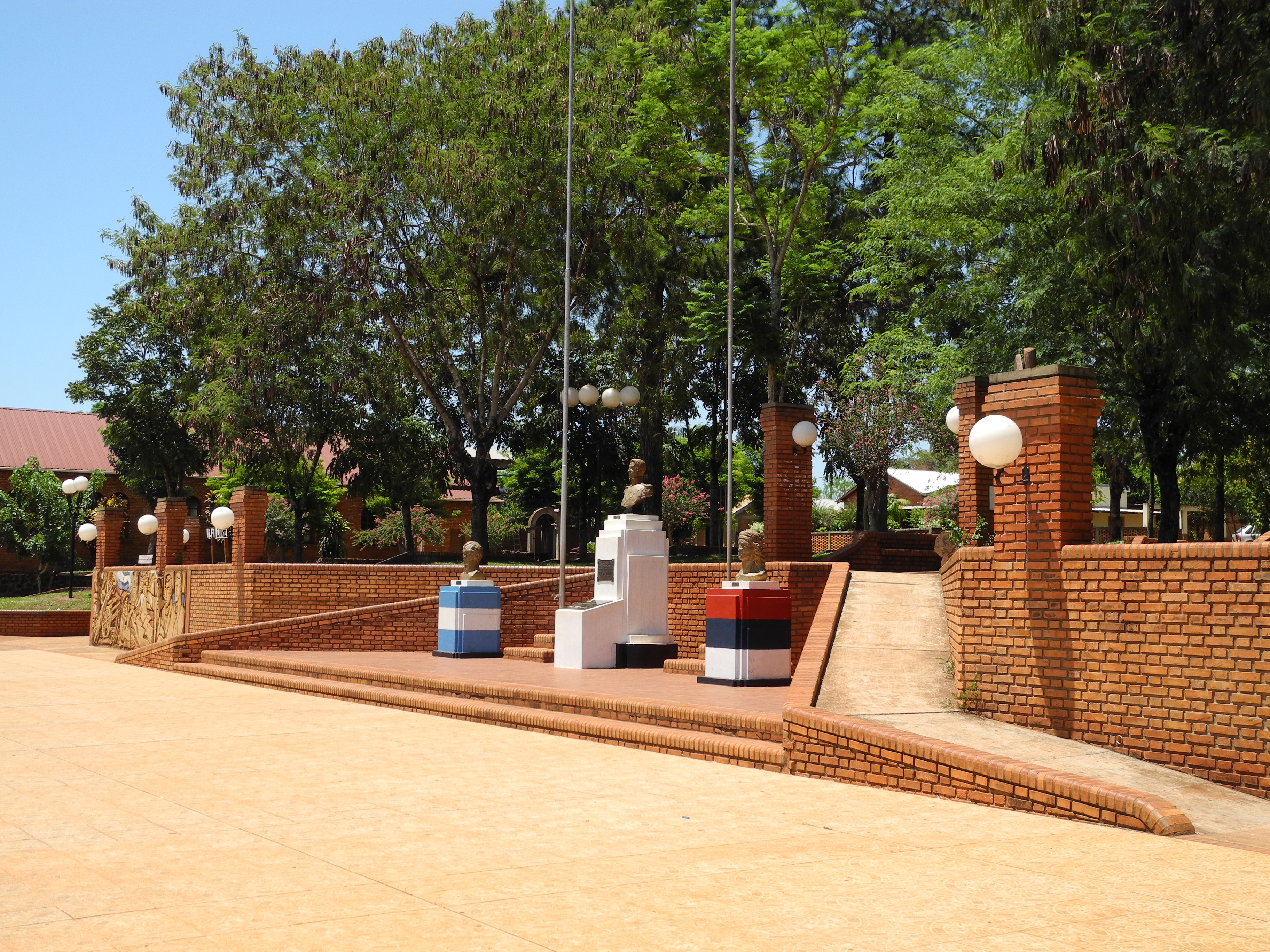 Puerto Libertad - Provincia de Misiones - Argentina - Plaza Gral. San Martín